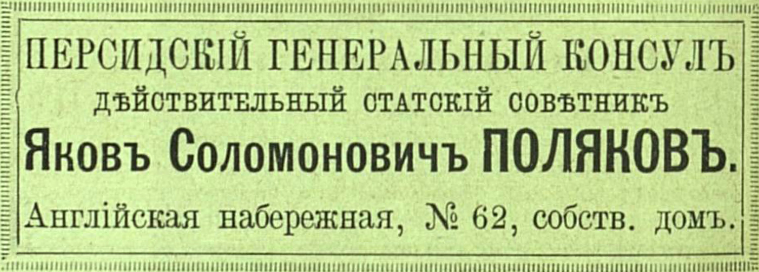 Объявление в справочнике Весь Петербург - генконсул Персии Я. С. Поляков, 1894 год.